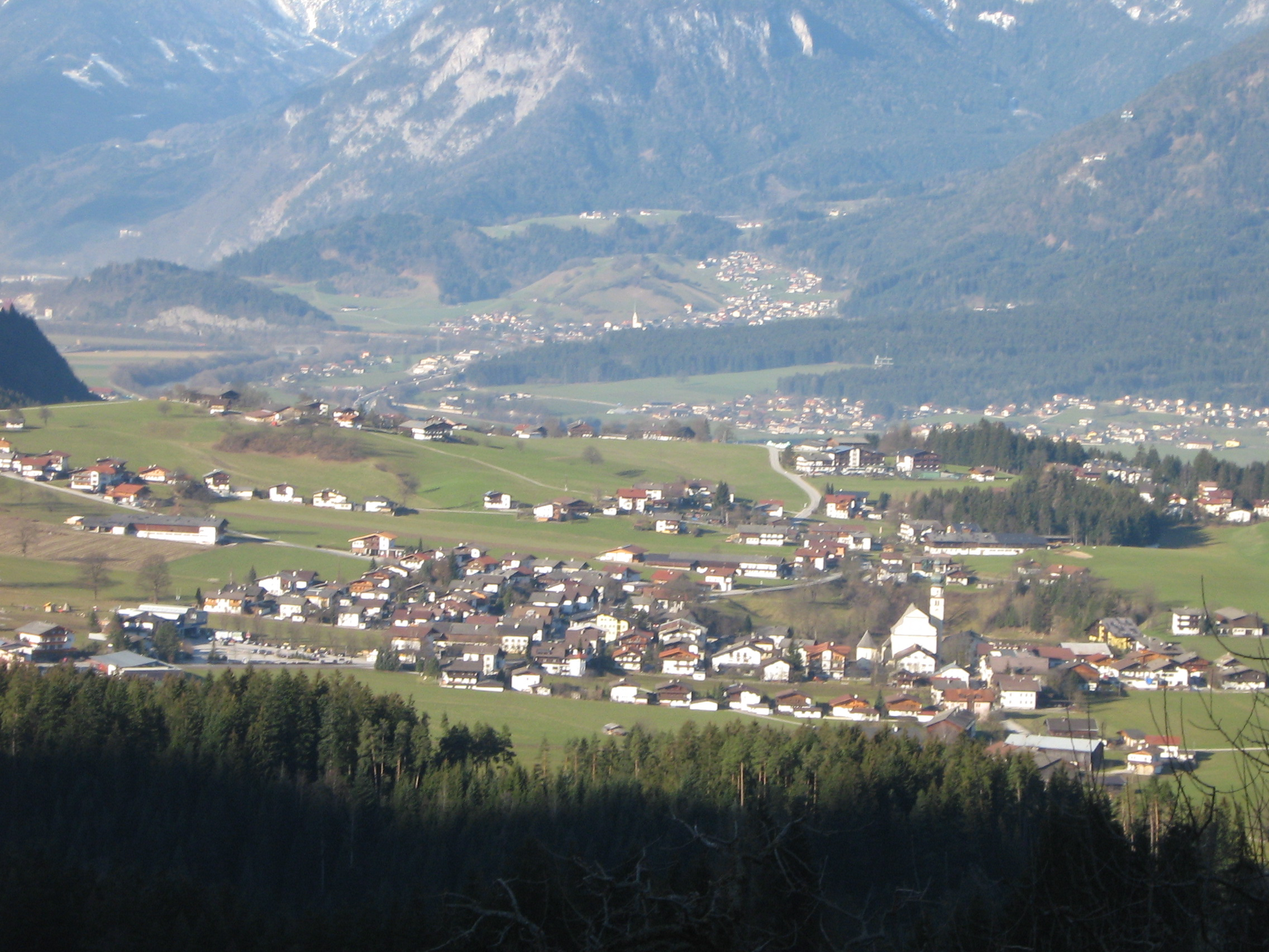 Reith vom Brunnerberg aus gesehen.